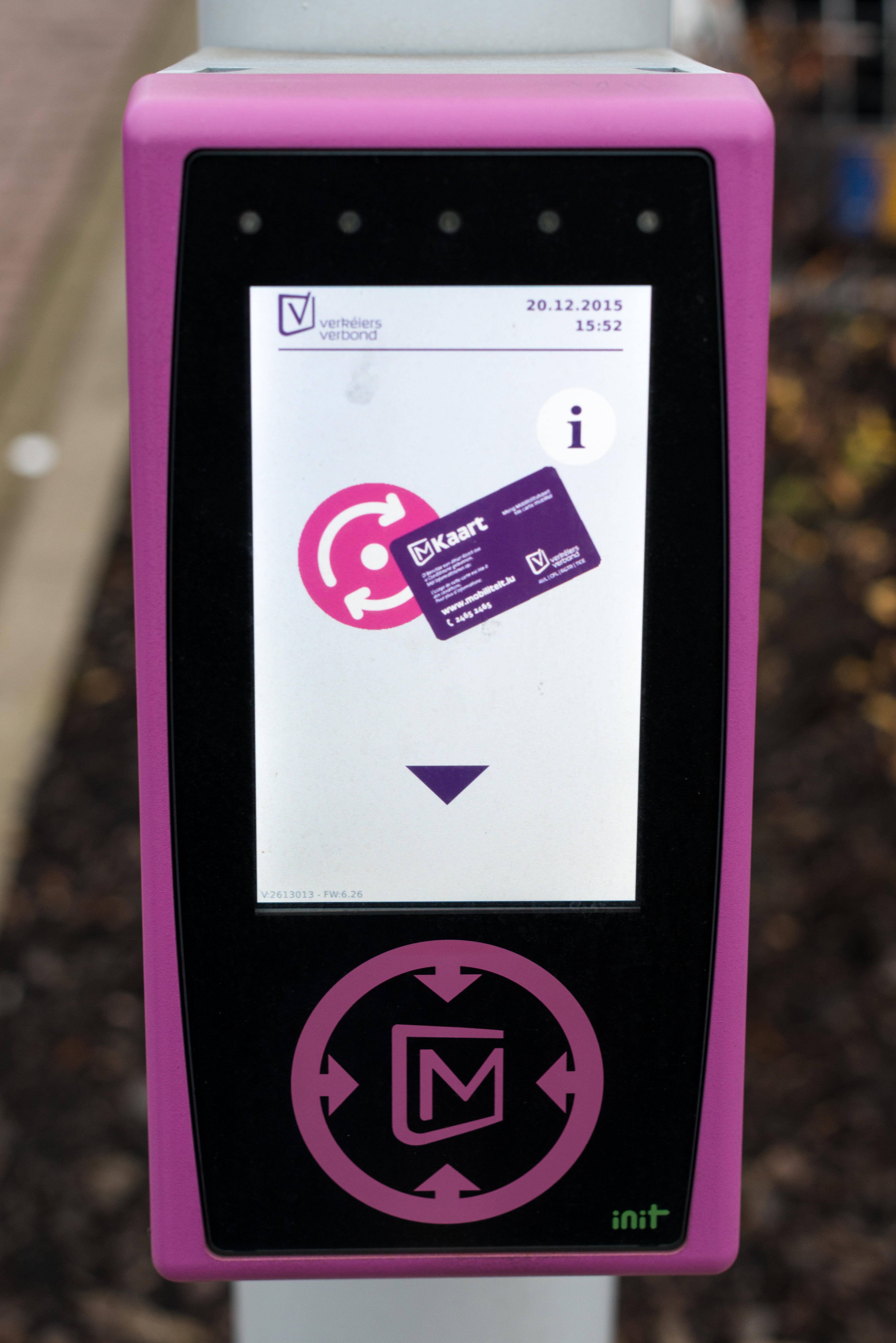 En mKaart-Composteur op der Diddelenger Gare.